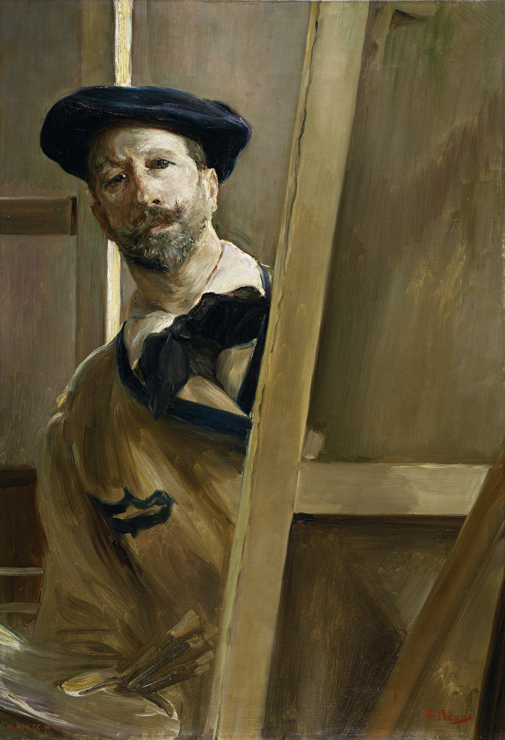 Autorretrato de José Villegas Cordero